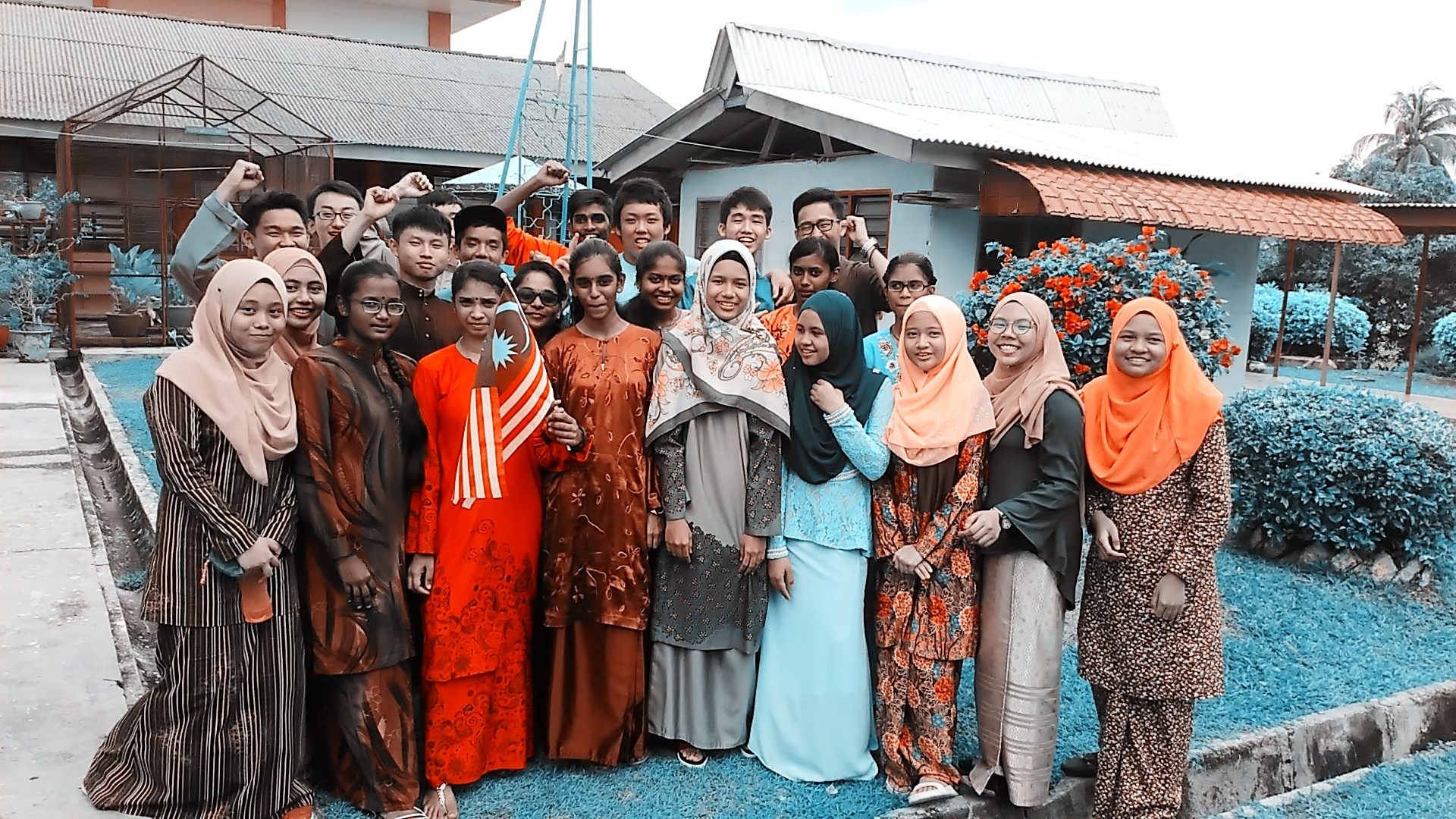 Walau berlainan bangsa & kaum, anak-anak SMKDA tetap bersatu